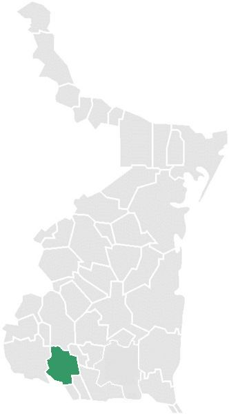 Municipio de Ocampo Tamaulipas, México